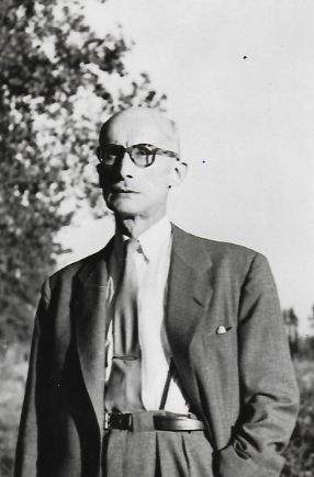 Cliché de 1949